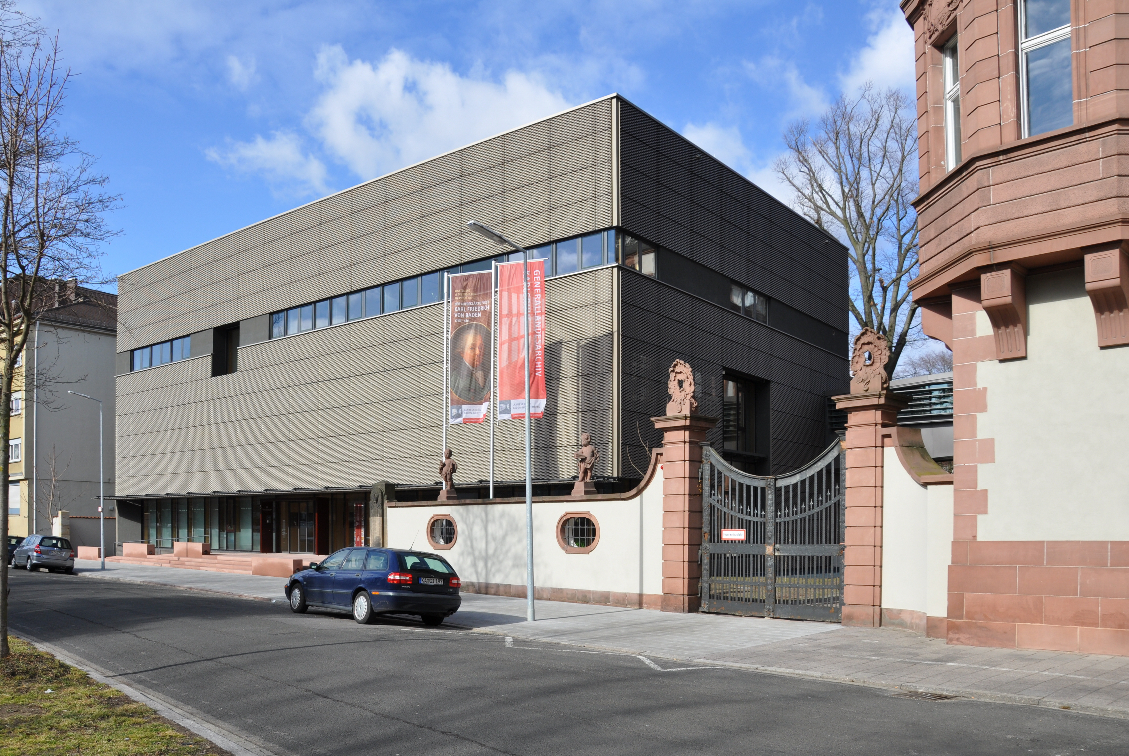 Generallandesarchiv Karlsruhe in der Karlsruher Weststadt